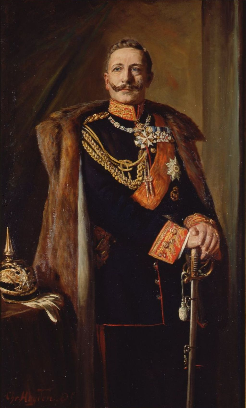 Ritratto del Kaiser Gugliemo II di Germania (1859-1941)